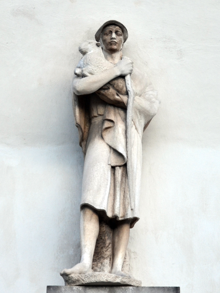 Bedřich Stefan: Dobrý pastýř (1940-49), mramor, levý boční portál Kostela Nejsvětějšího srdce Páně (Vinohrady), Praha